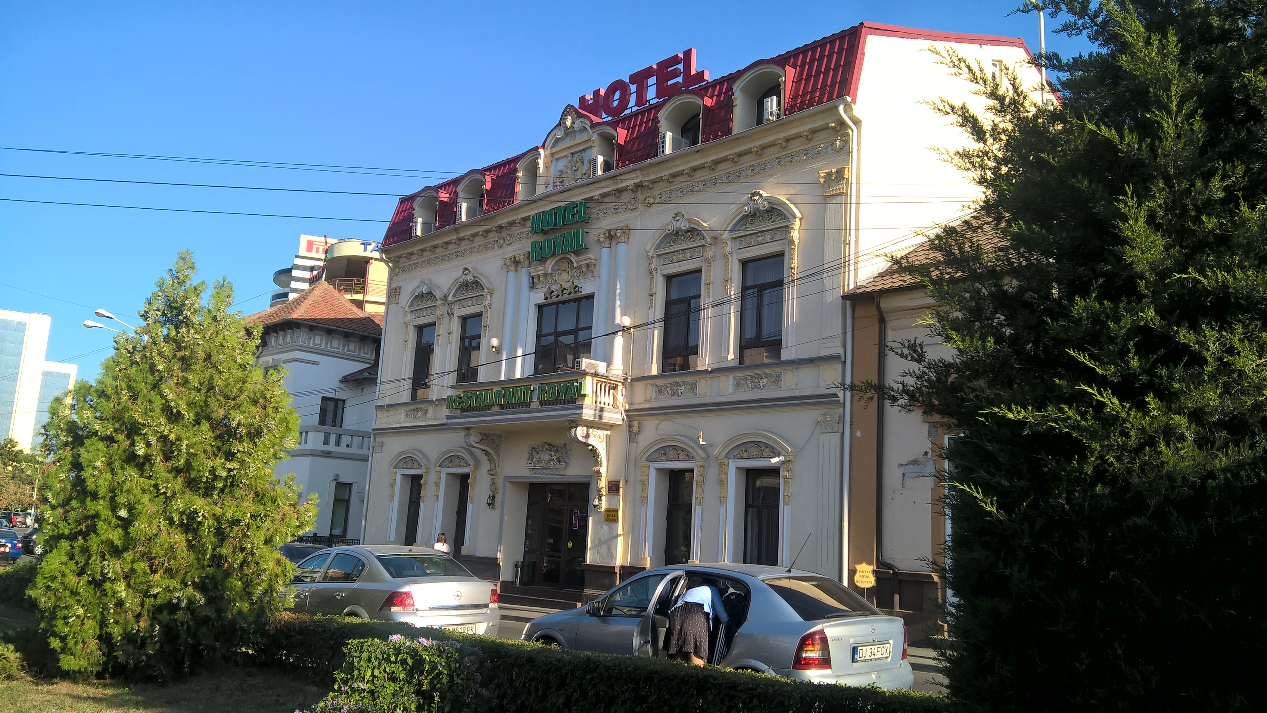 Casă-Romania Muncitoare